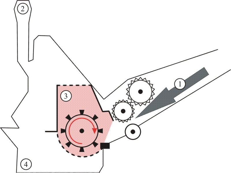 Funktionsskizze eines Schredders nach Hammer-und-Amboss-Prinzip